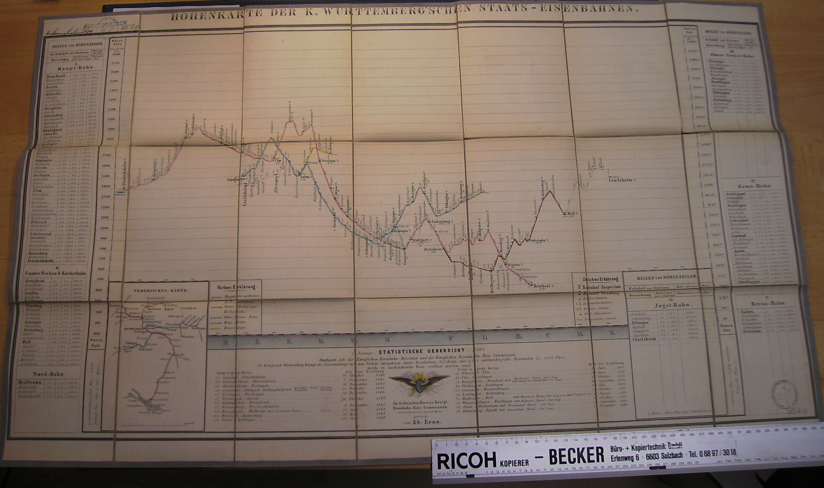 Höhenkarte der K. Württemberg'schen Staatseisenbahnen. Statistische Übersicht mit zahlreichen Legenden. Angaben in Meilen, Württ. Fuß und Pariser Fuß. Stuttgart: Kgl. Eisenbahn-Direction & Kgl. Eisenbahn-Bau-Commission, 1865 (Faltkarte, auf Leinen gezogen, im Original-Schuber, teilkoloriert)